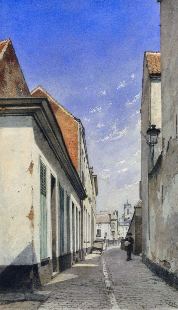 Peinture de Jacques Carabain, ca. 1897 Crayon et aquarelle sur papier Rue des Minimes